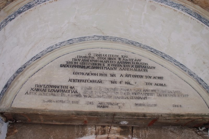 Ктиторская надпись семьи Данилиди в храме прп. Алипия в Анталии